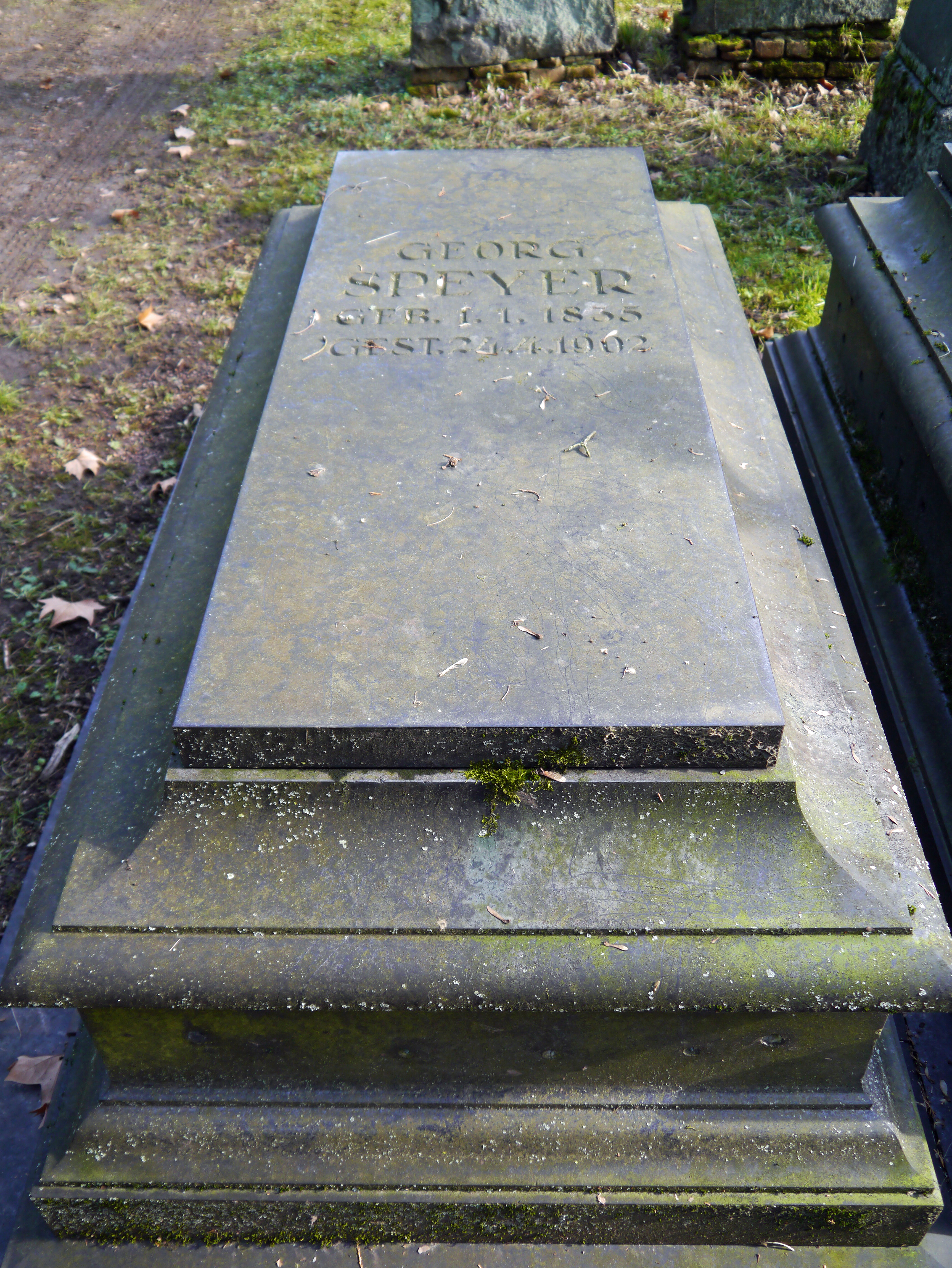 (Alter) Jüdischer Friedhof an der Rat-Beil-Strasse in Ffm. Grabstein von Georg Speyer.